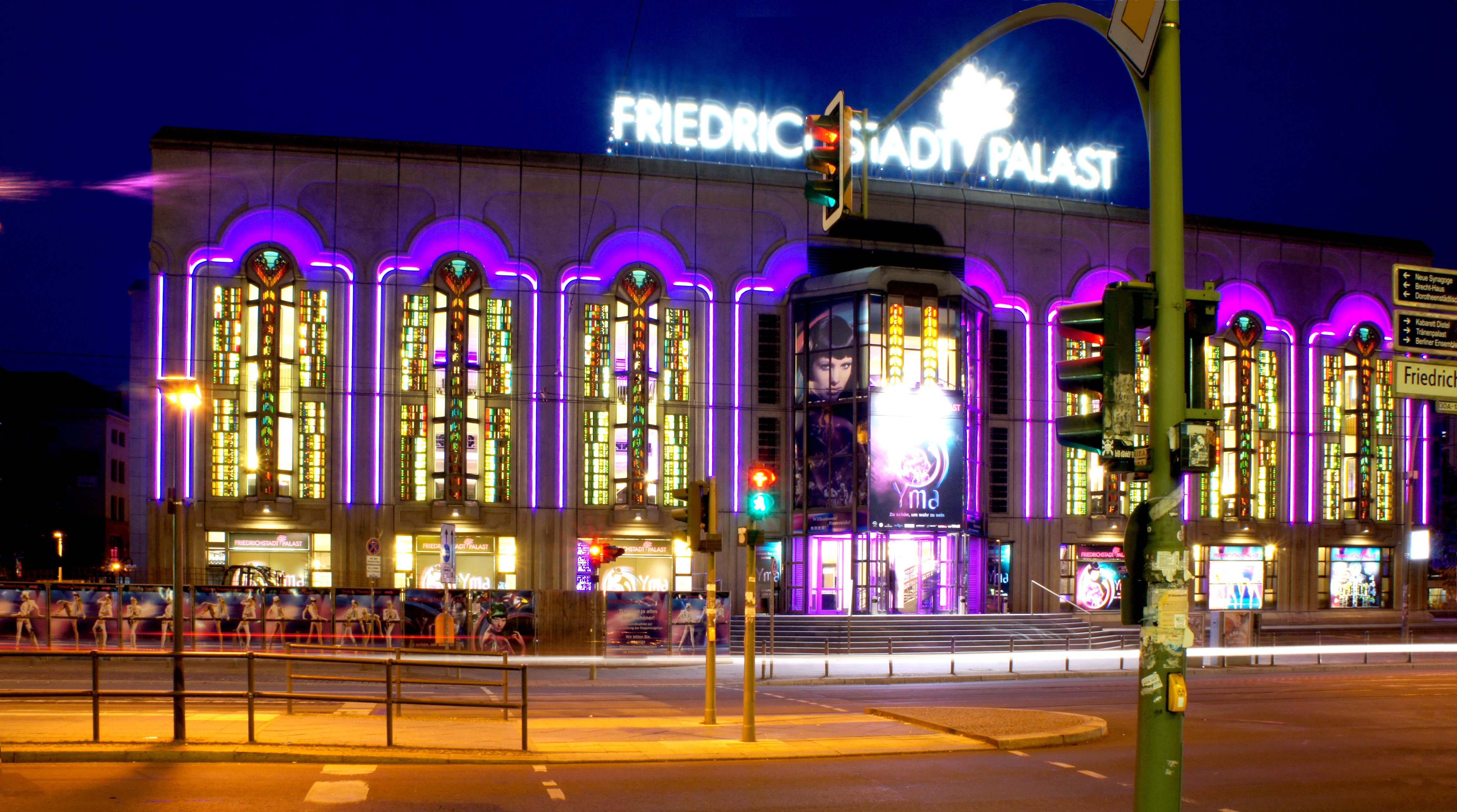 Friedrichstadtpalast